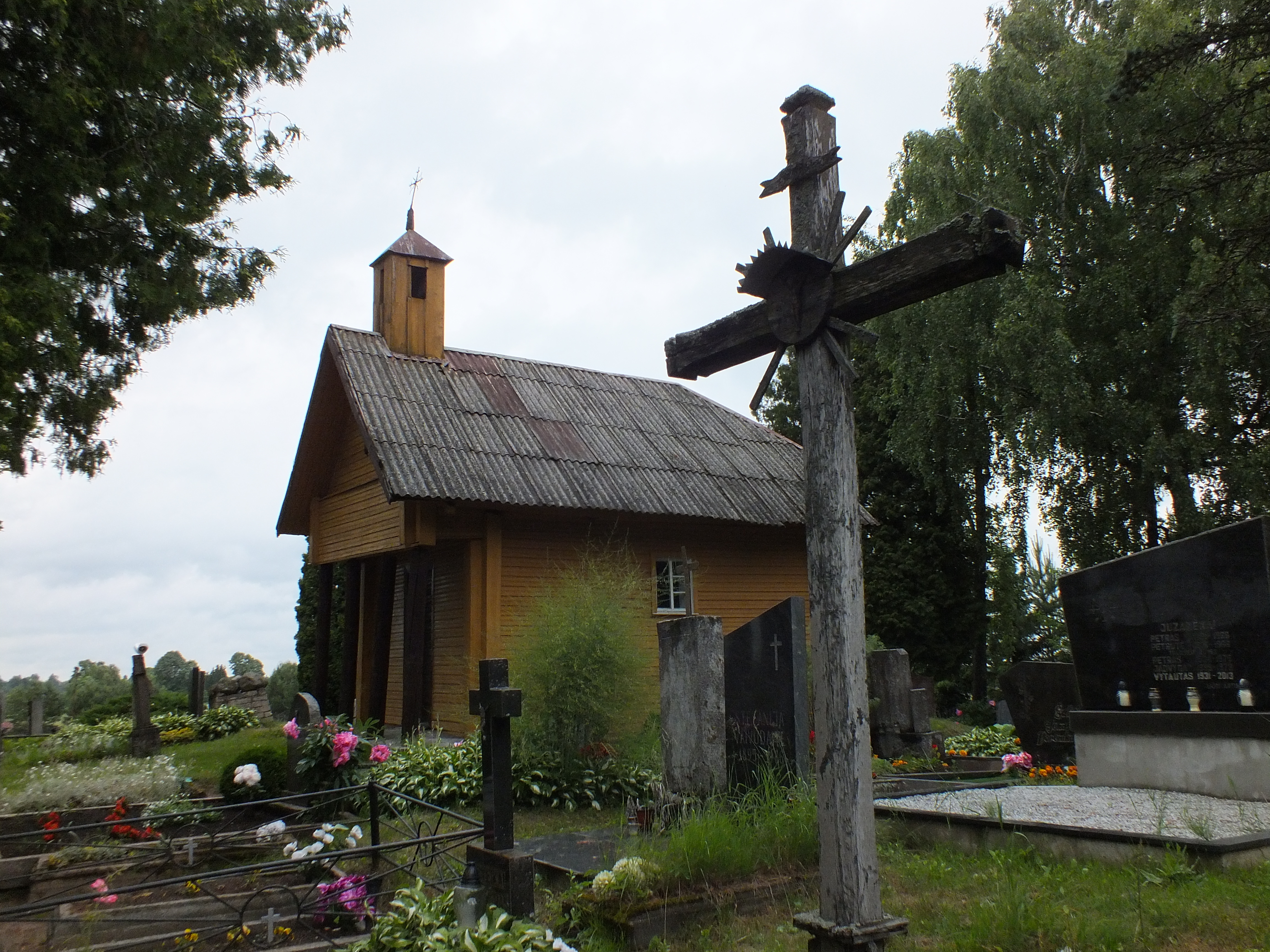 Viesų kaimo kapinių koplyčia